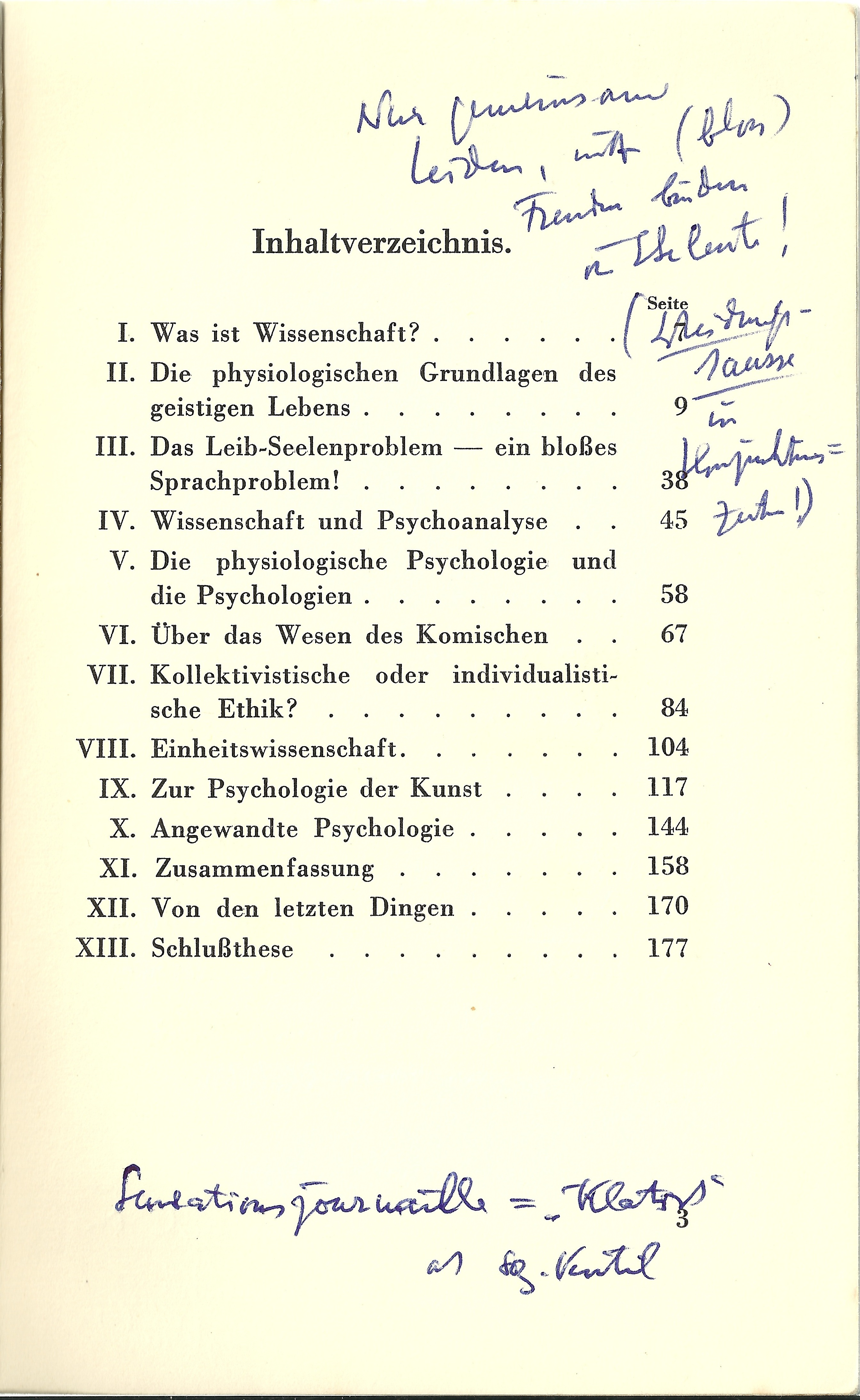 Inhaltsverzeichnis eines Handexemplars von Hans Martin Sutermeisters Psychologie und Weltanschauung (1944)